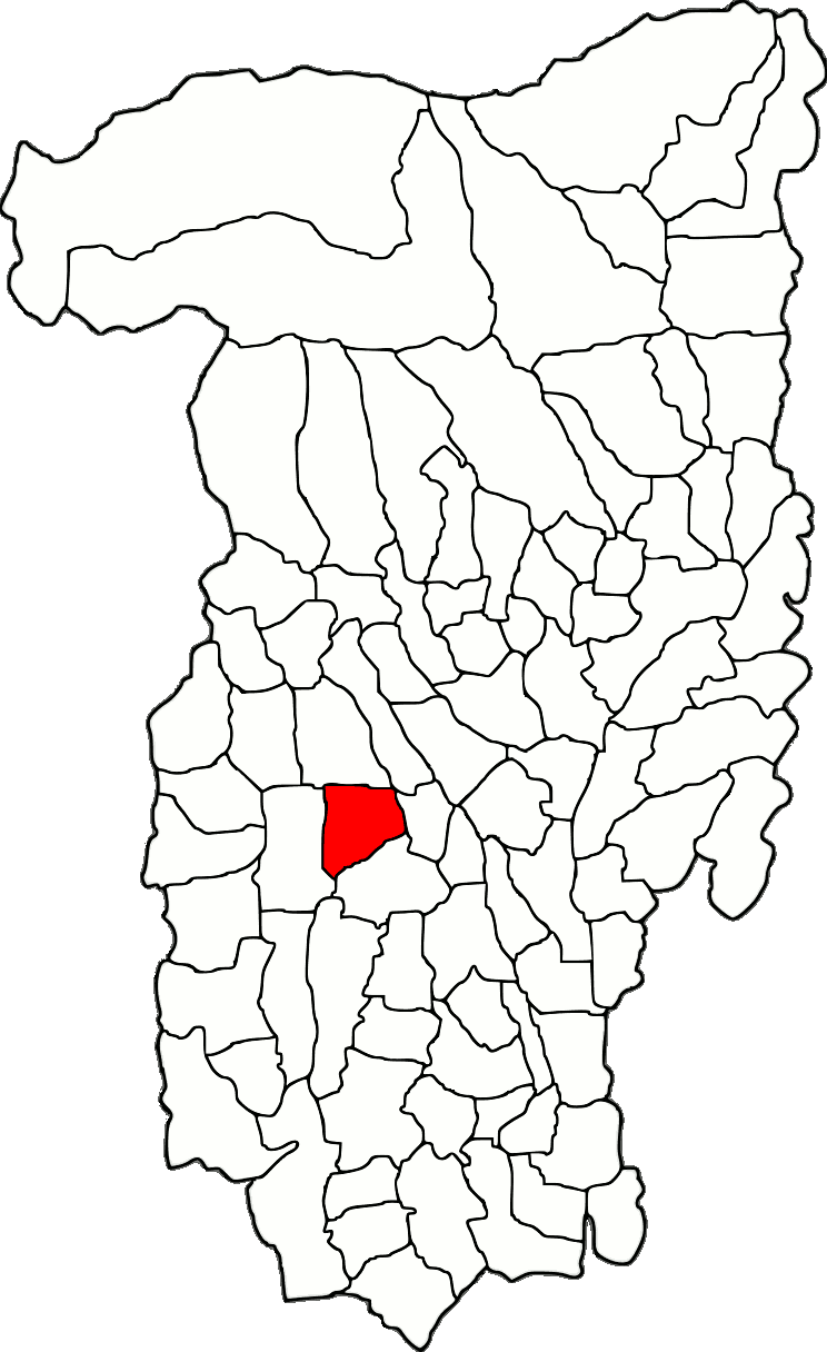 Lage der Gemeinde Lăpușata im Kreis Vâlcea (RO).